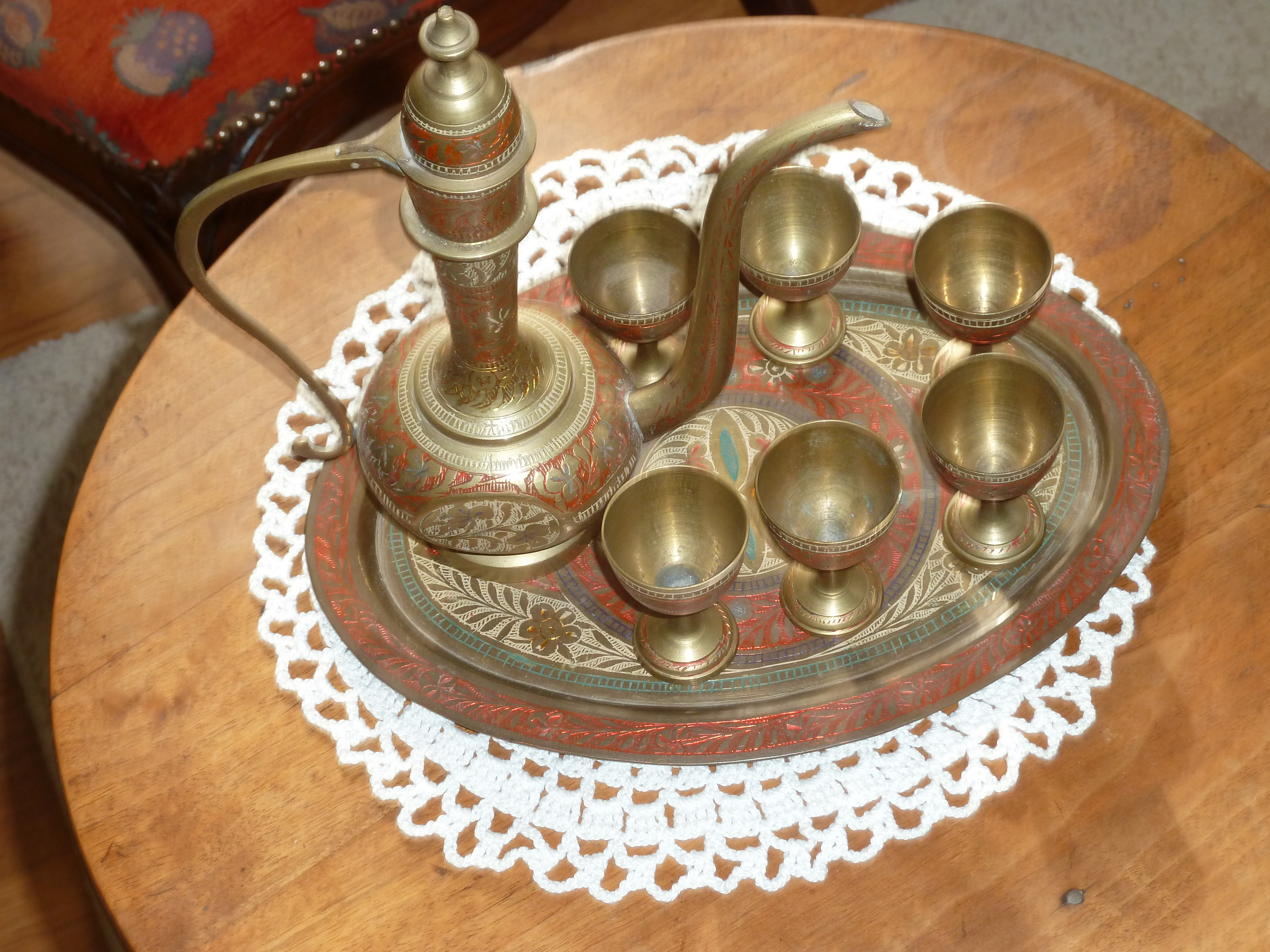 Service pour thé à la menthe entièrement cuivré ciselé et coloris divers. Cadeau reçu de Tunisie il y a une cinquantaine d'années mais peut-être d'une autre provenance. Est-ce authentique ?